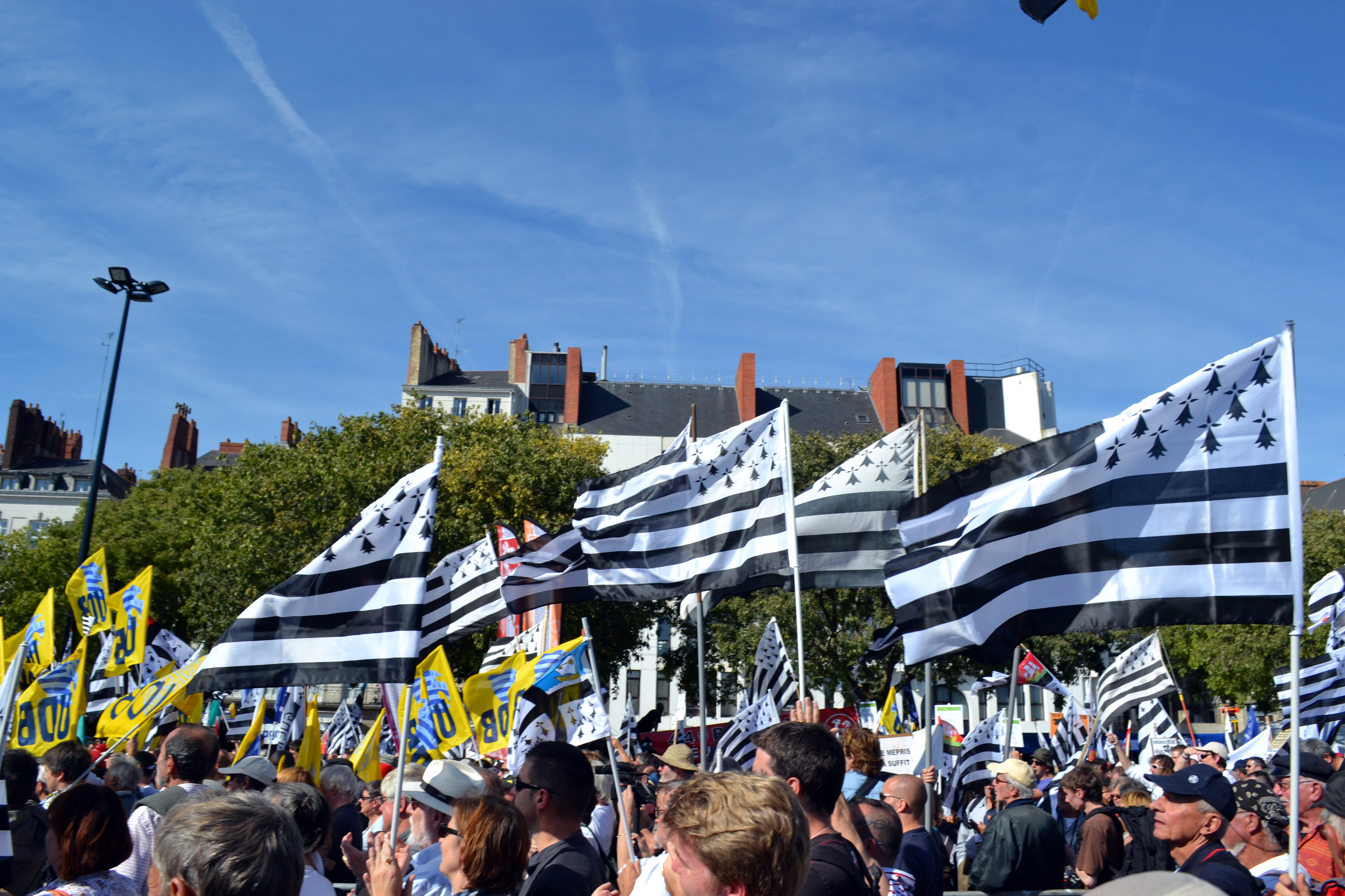 Des milliers de drapeaux bretons brandis à Nantes le 27 septembre 2014 pour célébrer la Bretagne entière et son projet d'avenir commun. La 3e grande manifestation populaire de l'année revendiquait une cohérence territoriale, économique, culturelle, pour que la péninsule plus que millénaire conserve son unité.